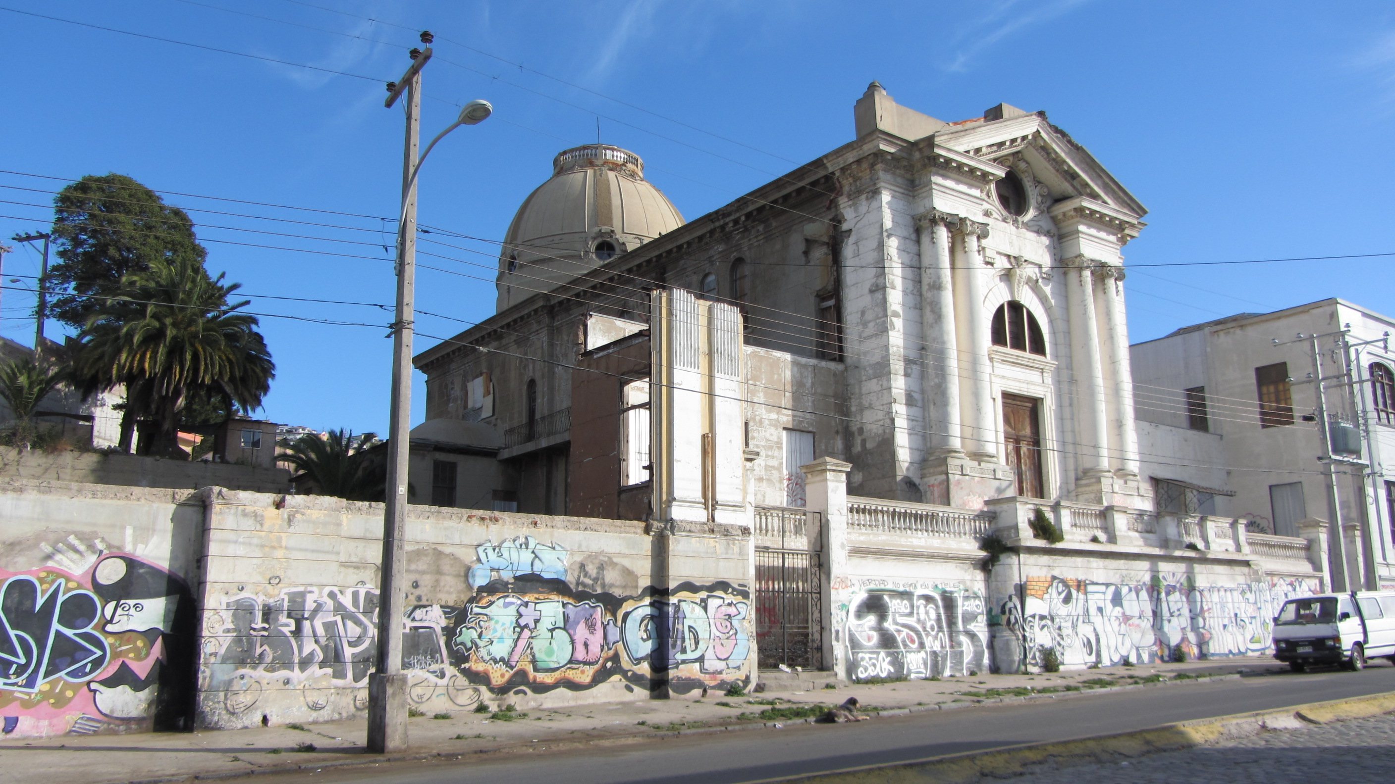 Capilla de la Providencia (street view) This is a photo of a national monument in Chile: 583